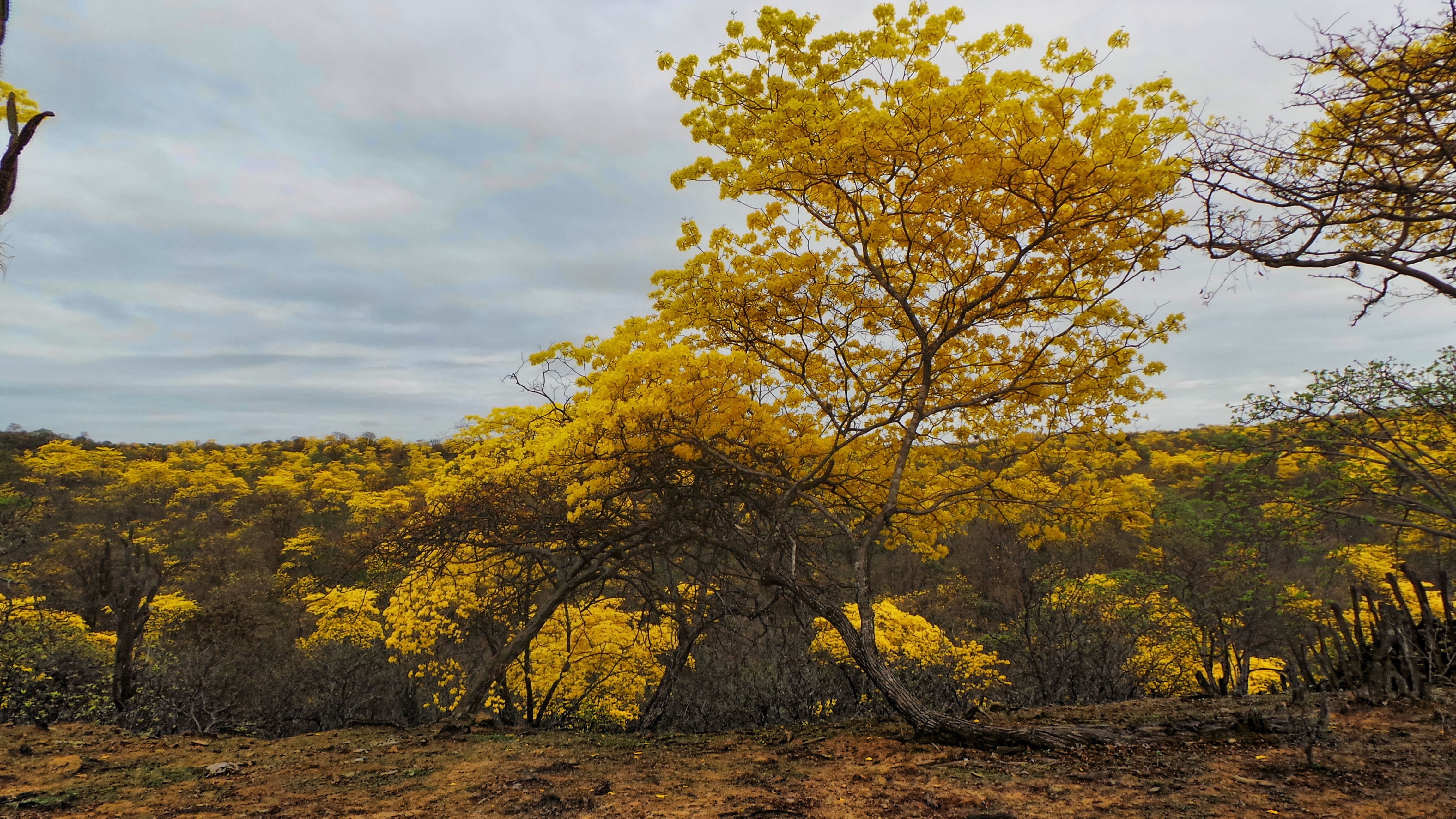 Mangahurco